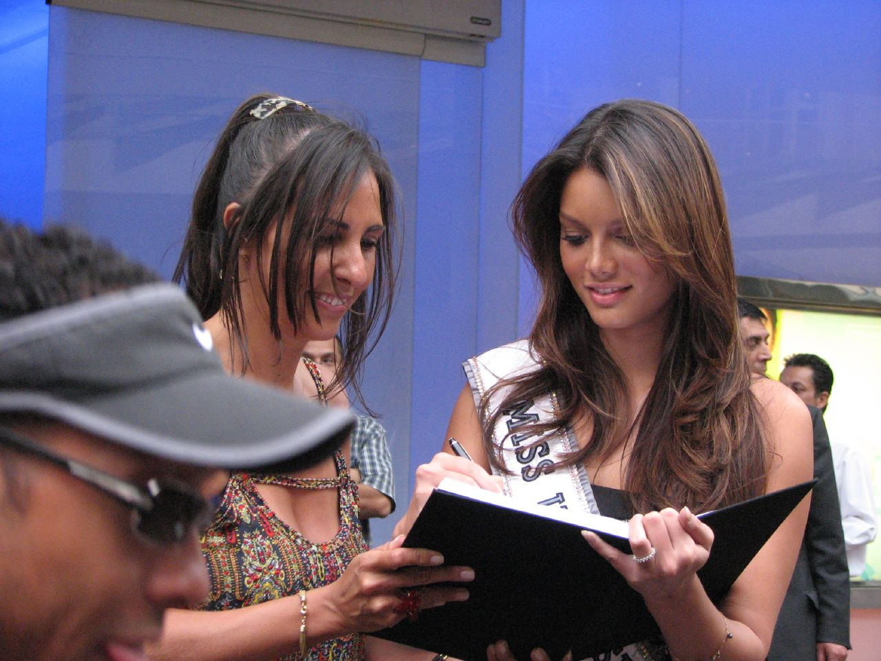 Zuleyka Rivera at Plaza Antara, Polanco, Mexico